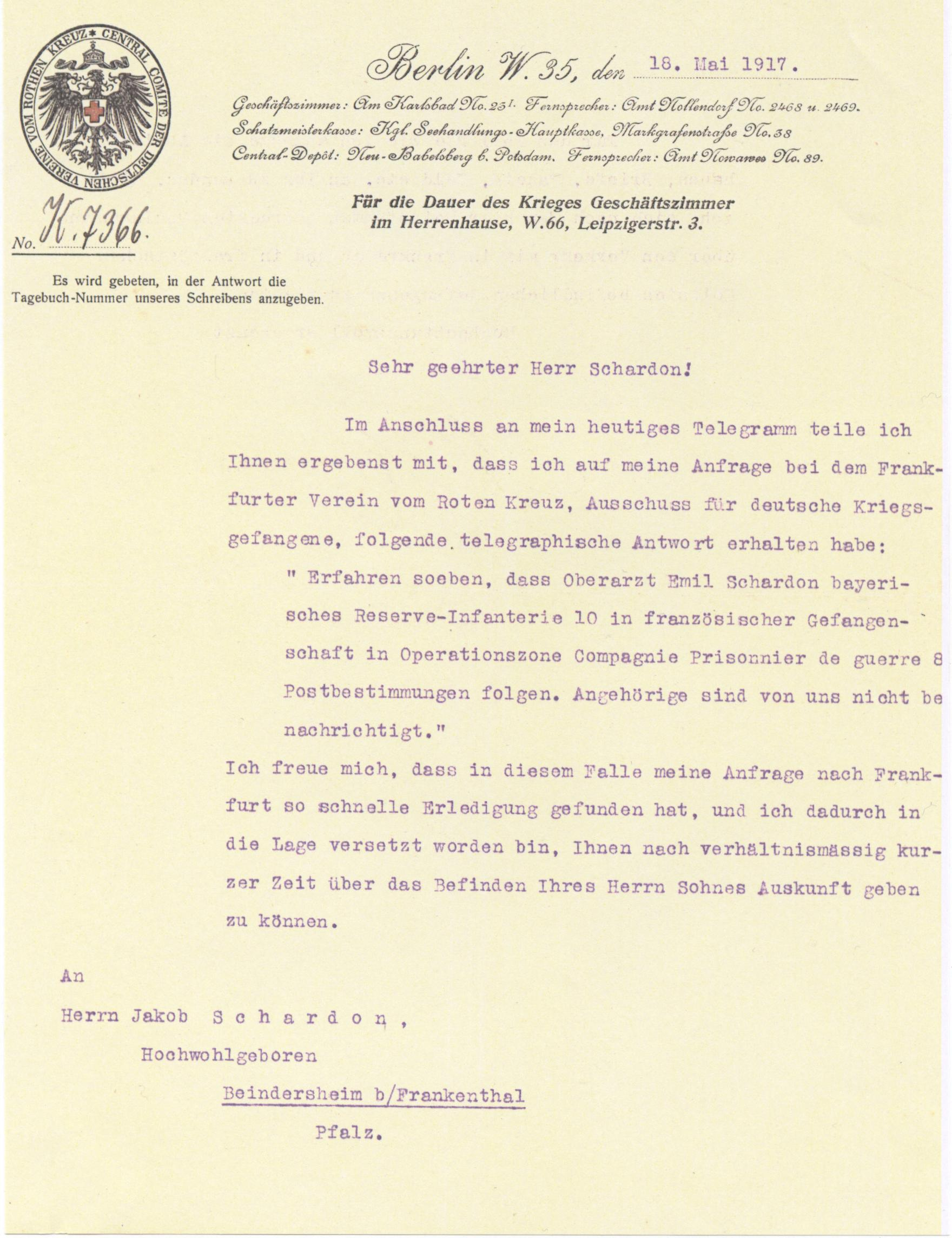 Mitteilung über Gefangennahme Dr. Emil Schardon Beindersheim, 1917, eigener Scan von eigenem Brief